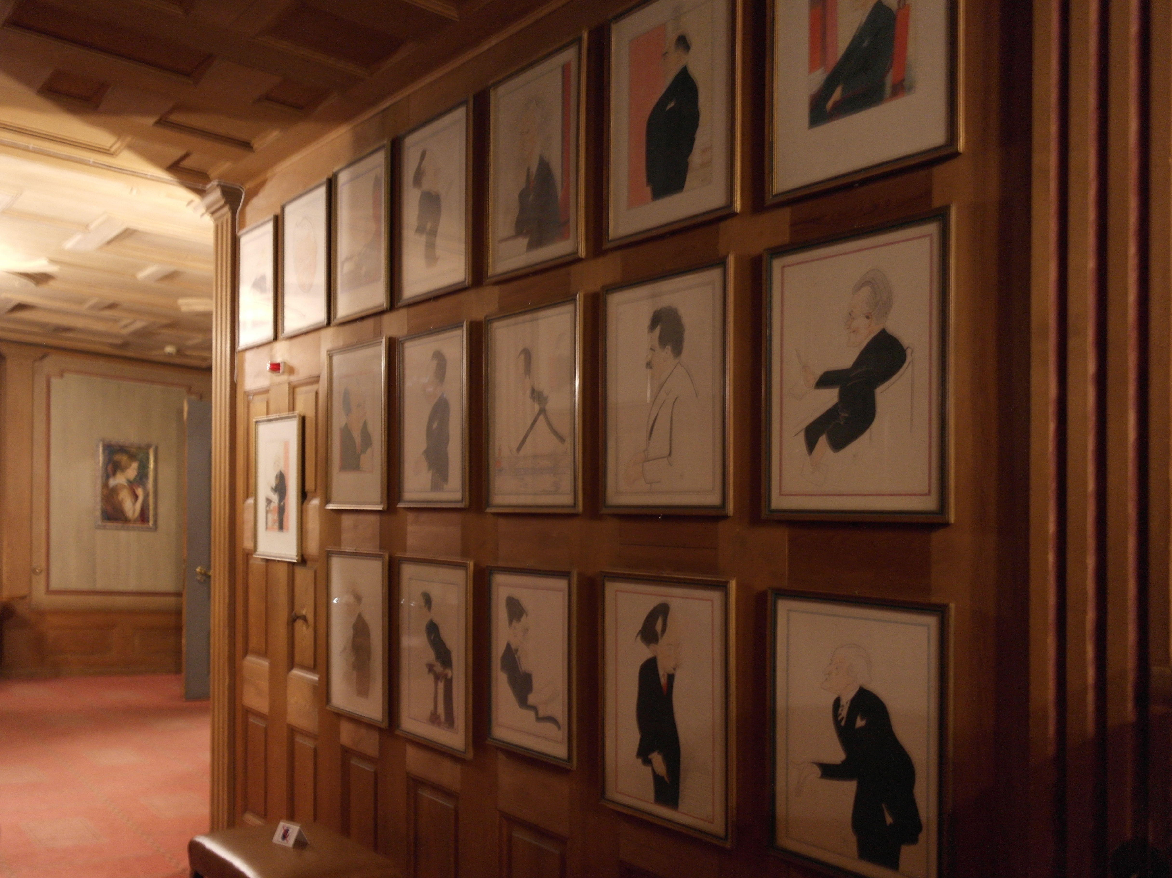 Passage med karikatyrteckningar, vid Rådsalens bibliotek